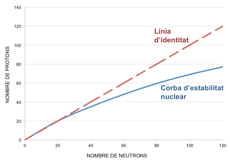 Correspondència entre el nombre de neutrons i protons en el nucli d'un àtom